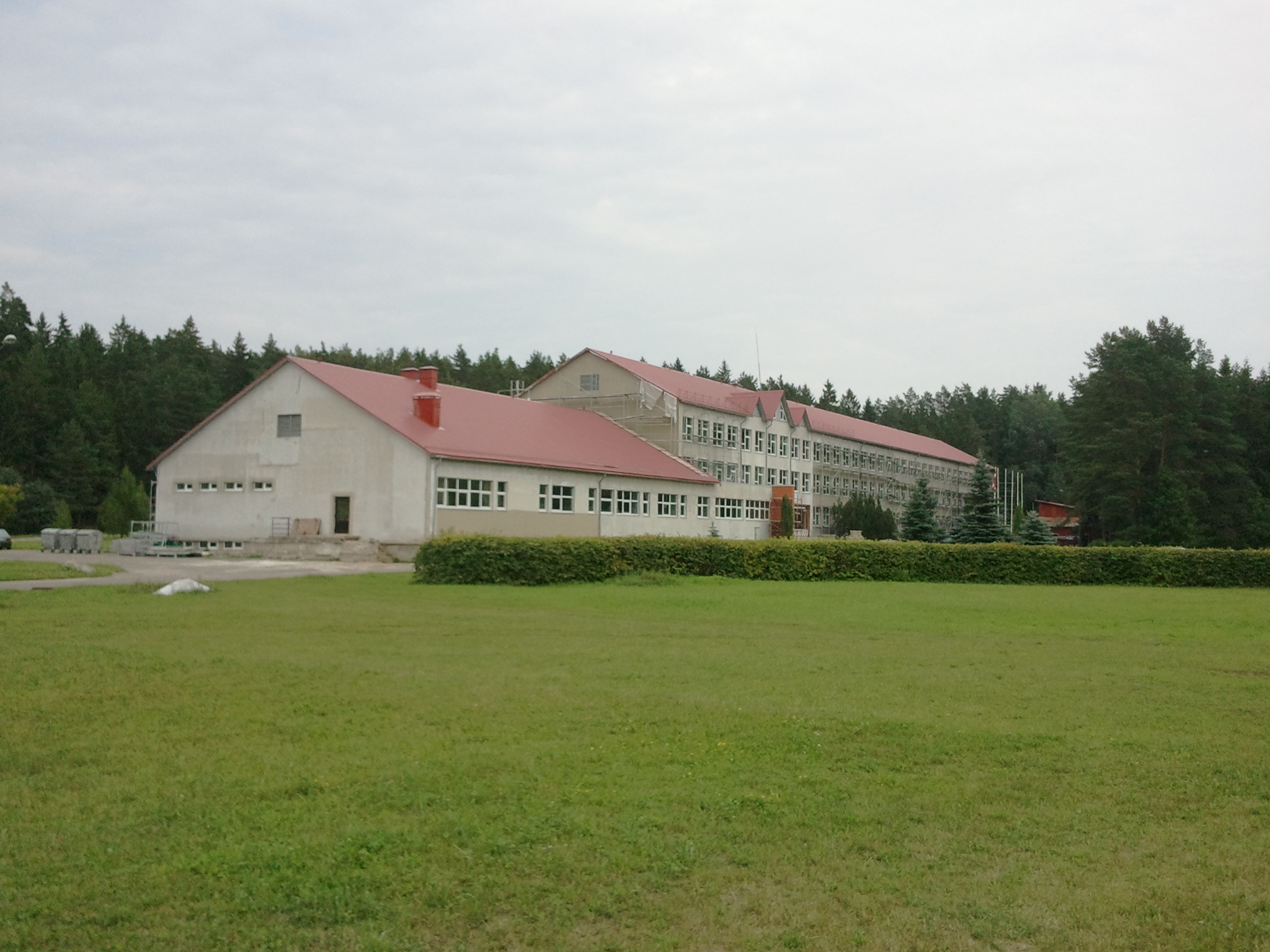 Ogres Meža tehnikums (Ogres valsts tehnikums)